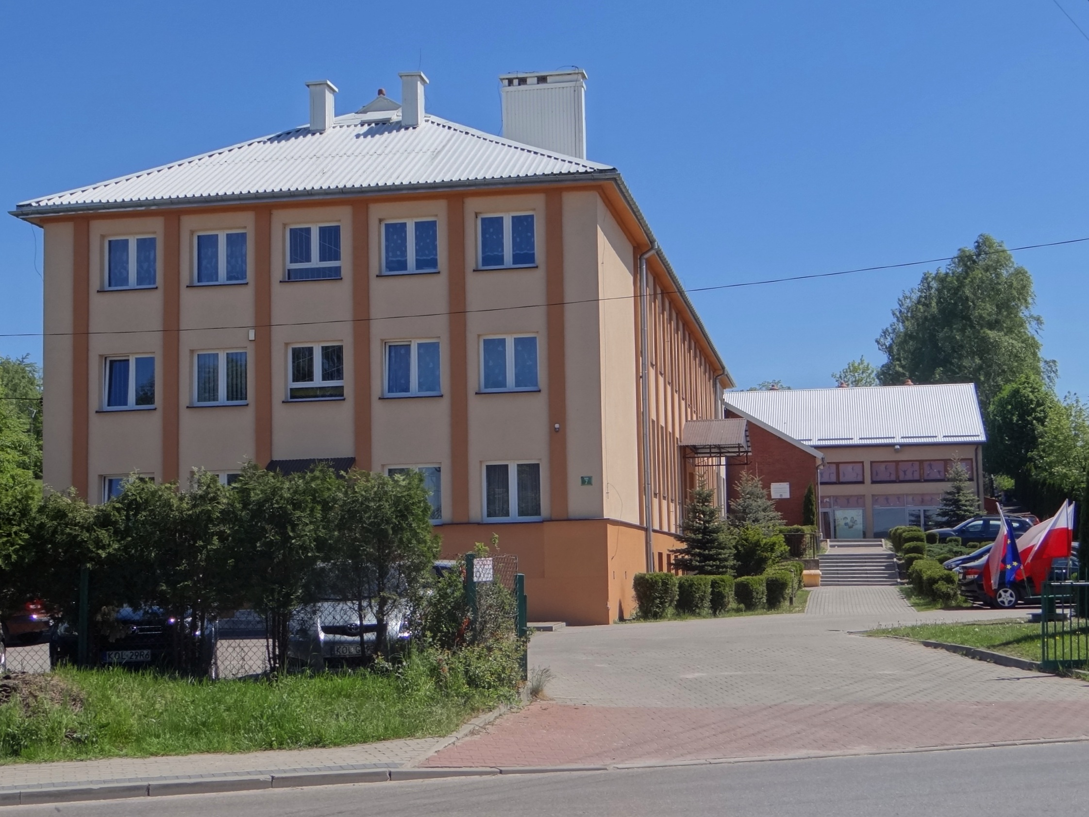 Szkoła w Dłużcu